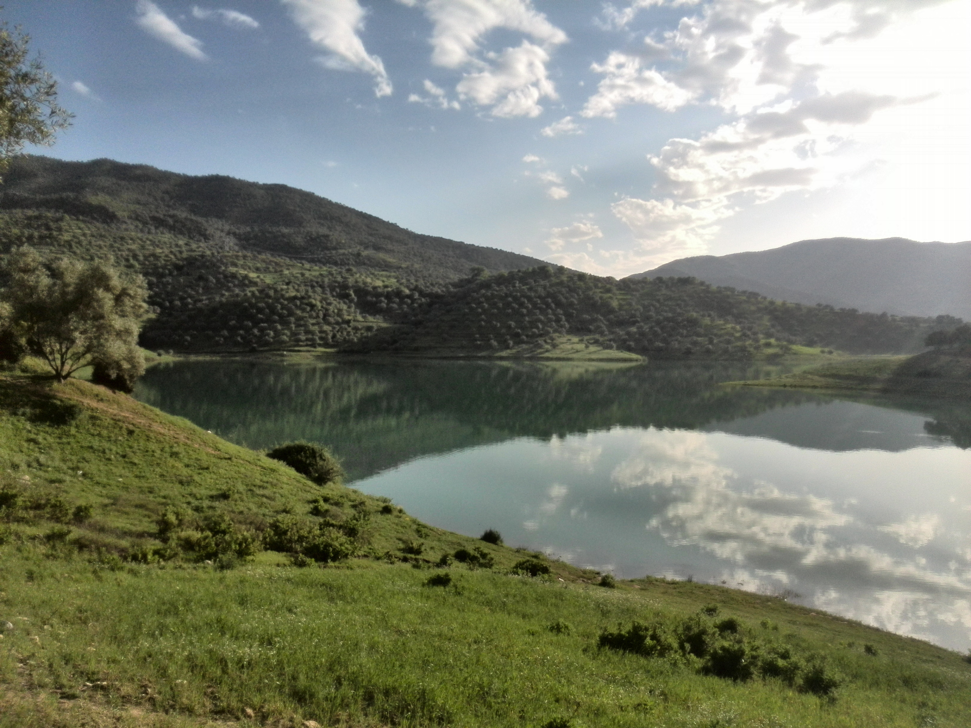 سدّ الوحدة في مدينة تاونات بالمغرب